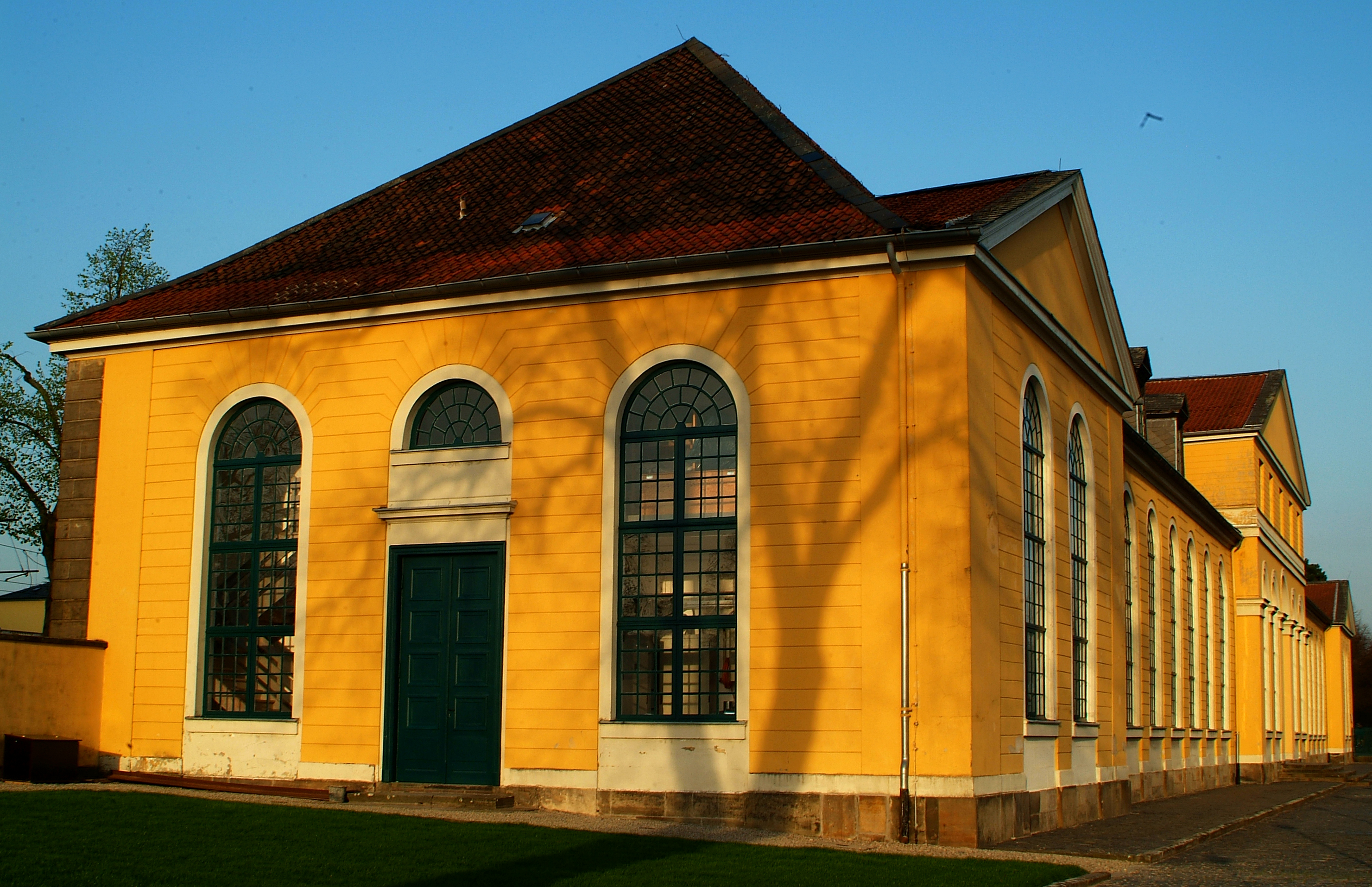 Sie haben bessere Bilder? Sogar ältere? Zeigen Sie' s uns. Allen.